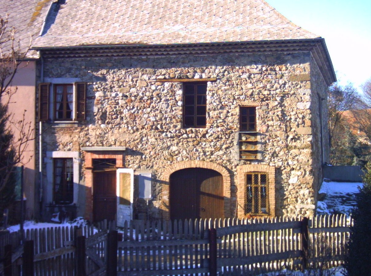 Maison ancienne à Poligny (Hautes-Alpes). A gauche, l'habitation ; à droite l'"écurie" (la remise) surmontée par la grange, à laquelle on accède par le "montage" (la rampe) accolé(e) au bâtiment.